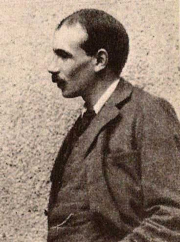 John Maynard Keynes (antes de 1913)